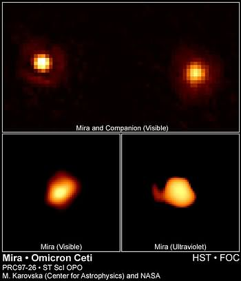 Eine Hubble-Aufnahme von Mira und seinem Begleiter am 11. Dezember 1995.